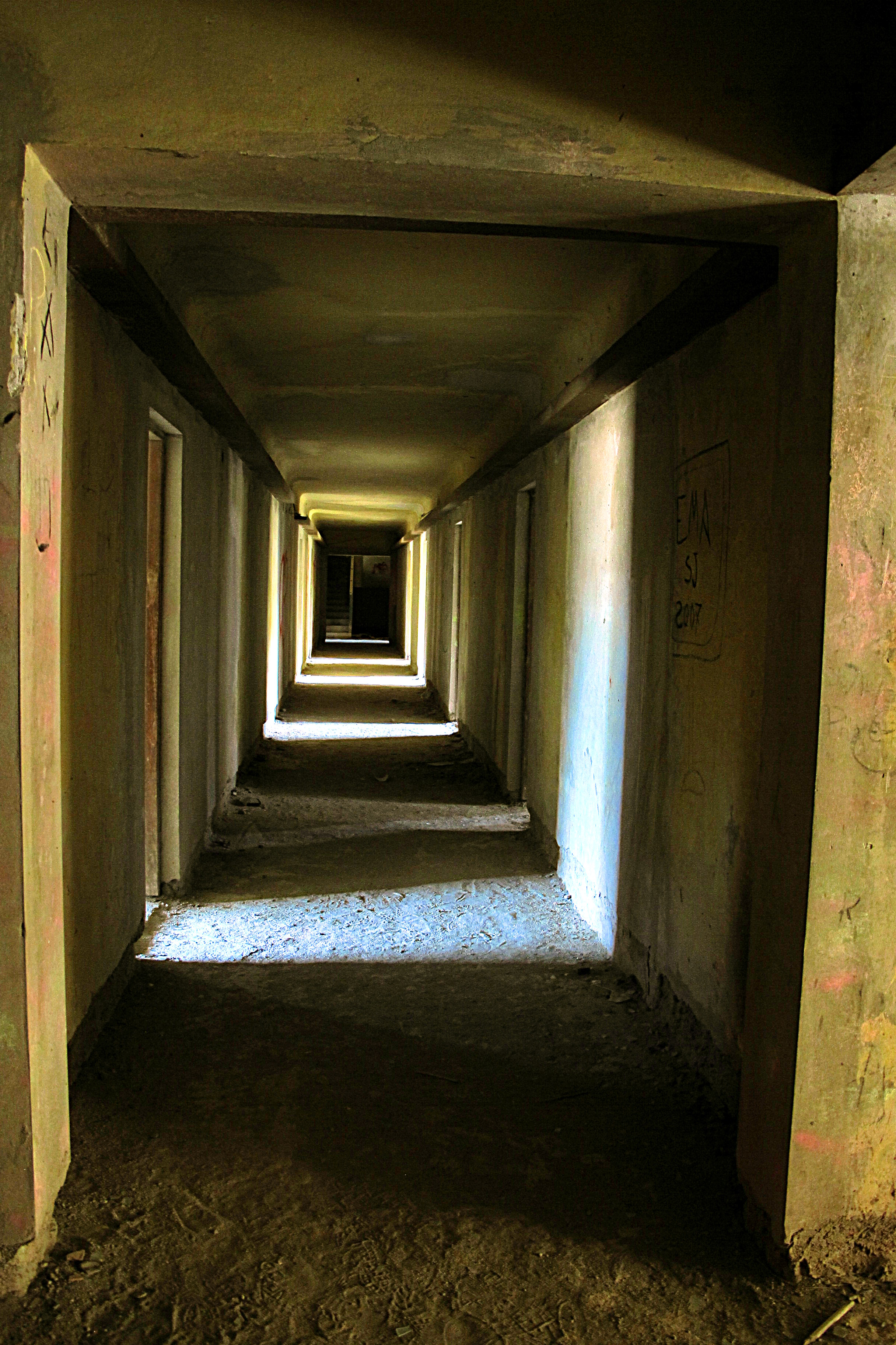 Vista interior desde el Hotel No.5 Unidad Turística Embalse